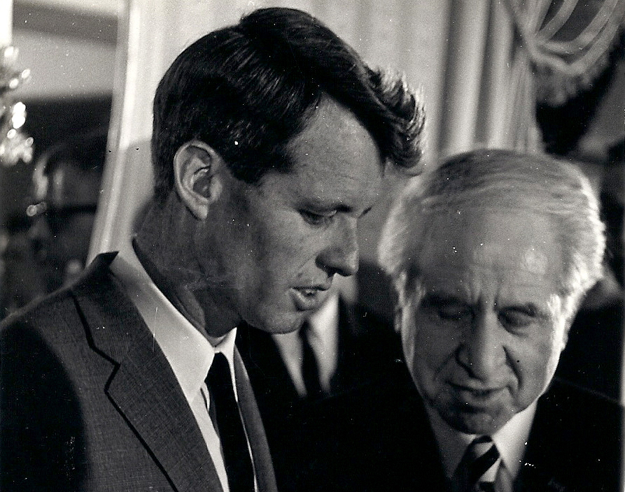 US-Justizminister Robert F. Kennedy auf Wahlkampf-Tournee durch New York am 27. Oktober 1964. Foto Hans Bosshard